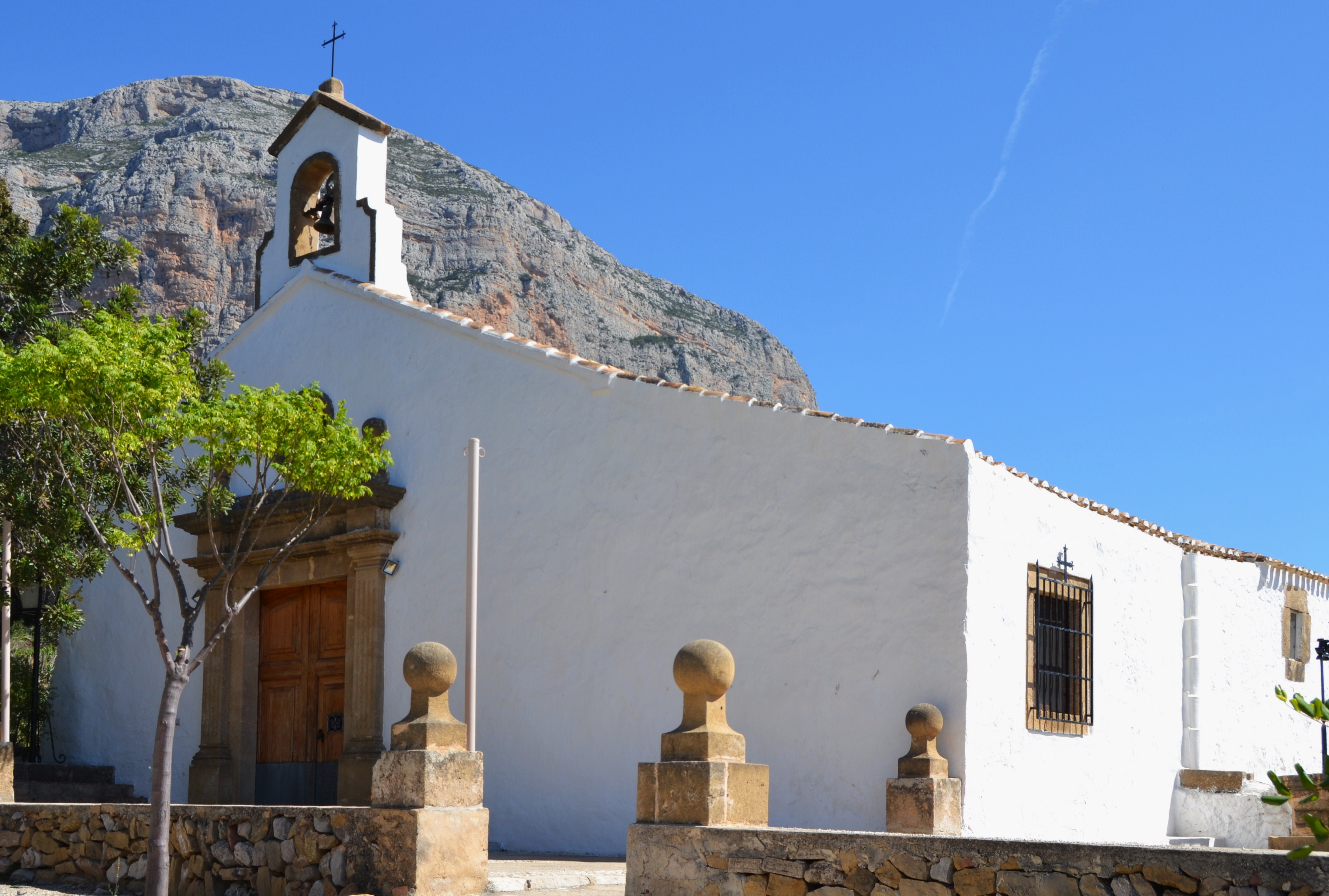 Ermita del Pòpul (Xàbia).